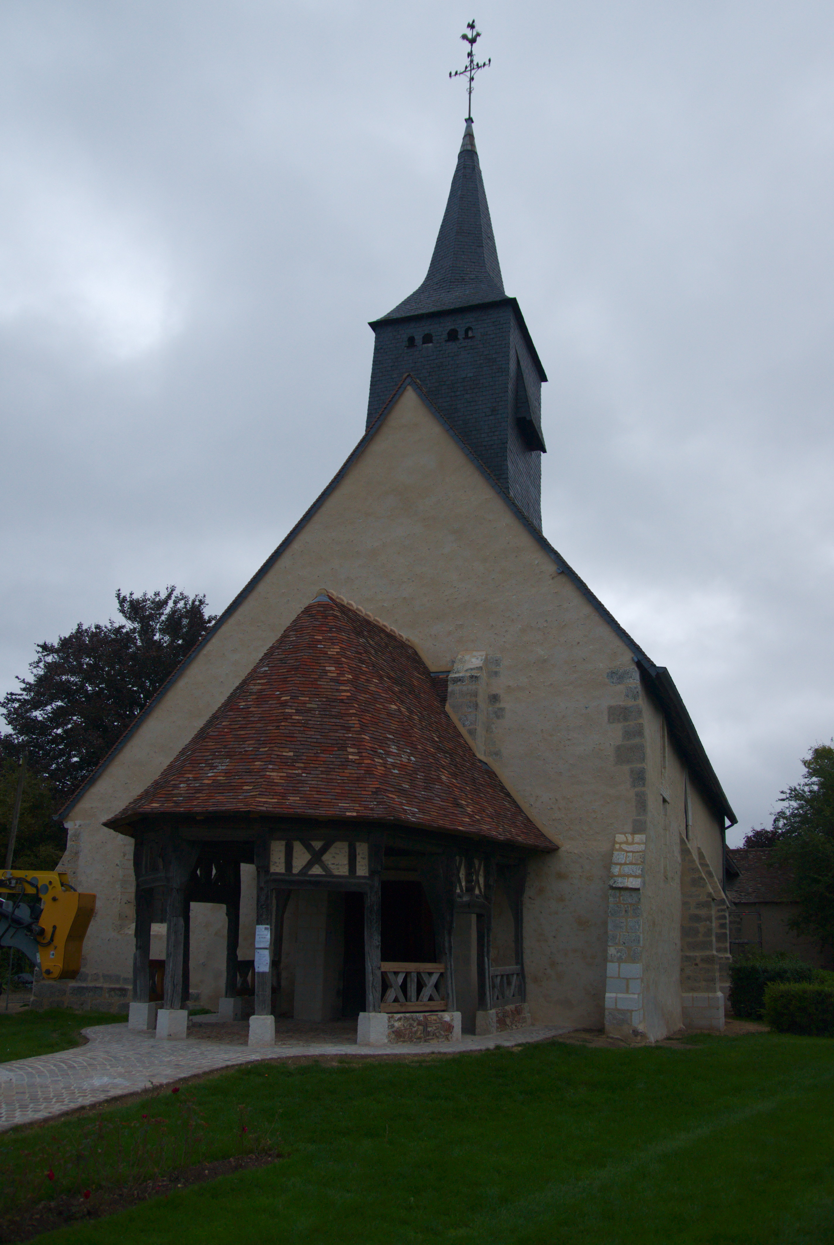 Église Saint-Germain de Marcilly-la-Campagne .